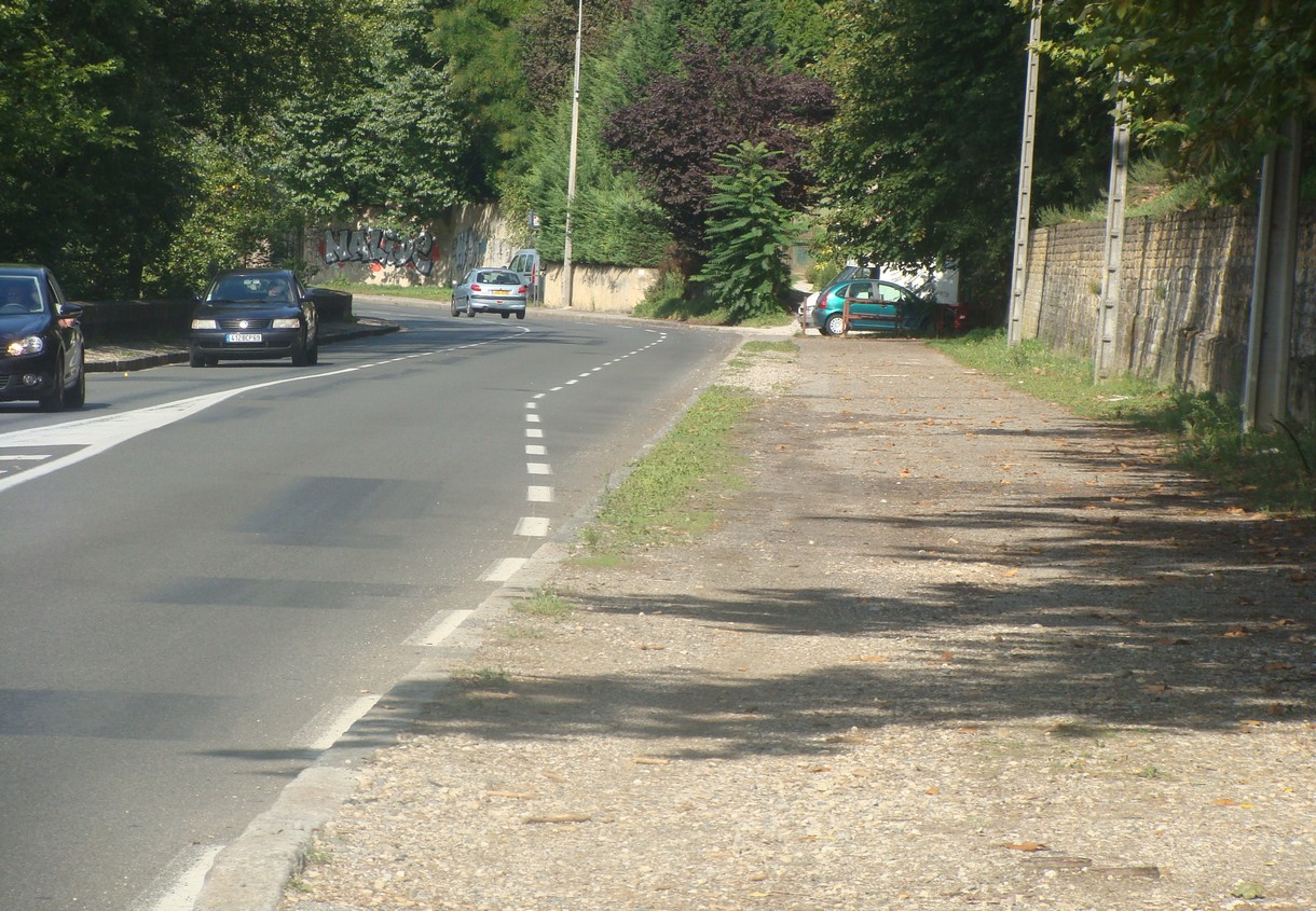 L'emplacement de l'évitement de l'île Roy, entre le pont de Collonges et Fontaines, situation actuelle (vue prise en direction du nord). La voie nord-sud était à droite de la photo, la voie sud-nord au milieu, sur chaussée ; les rames allant vers Neuville étaient dans le sens de la circulation automobile.